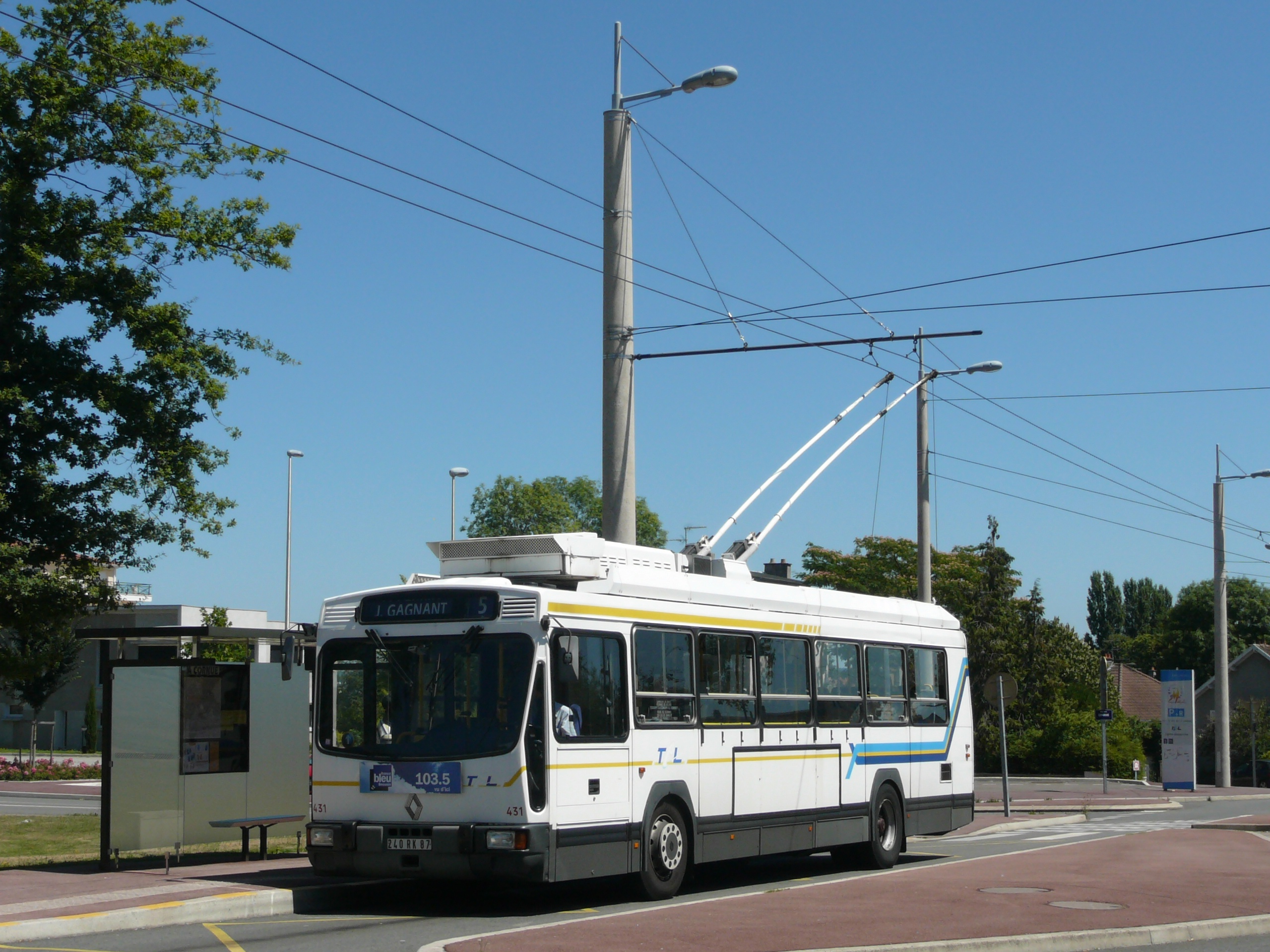 Trolleybus Renault ER100.2H de la ligne 5 au terminus de La Cornue